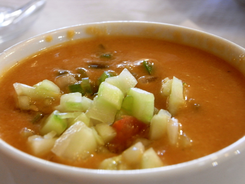 Tazón de gazpacho, con su guarnición. See post in My blog at Link